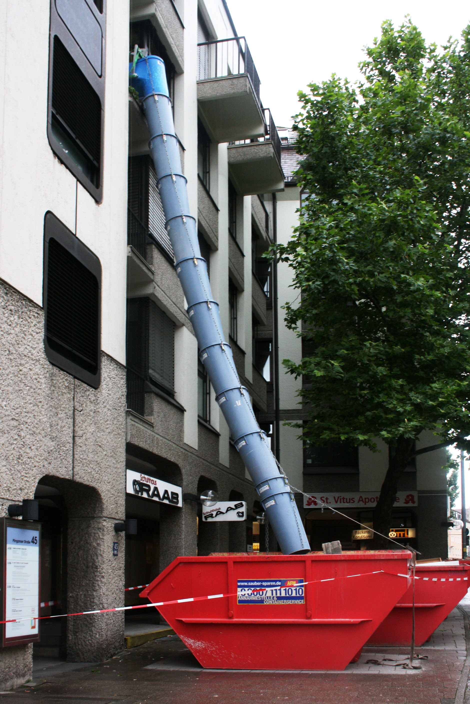 Stecksystem zum Abtransport von Bauschutt aus oberen Etagen (Schuttrutsche)